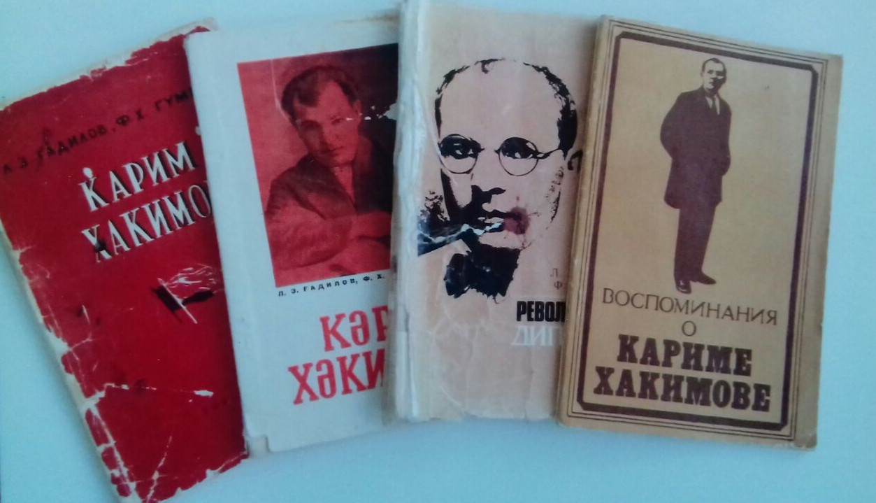 Книги, написанные Гадилловым Лутфи Закировичем о Кариме Хакимове.